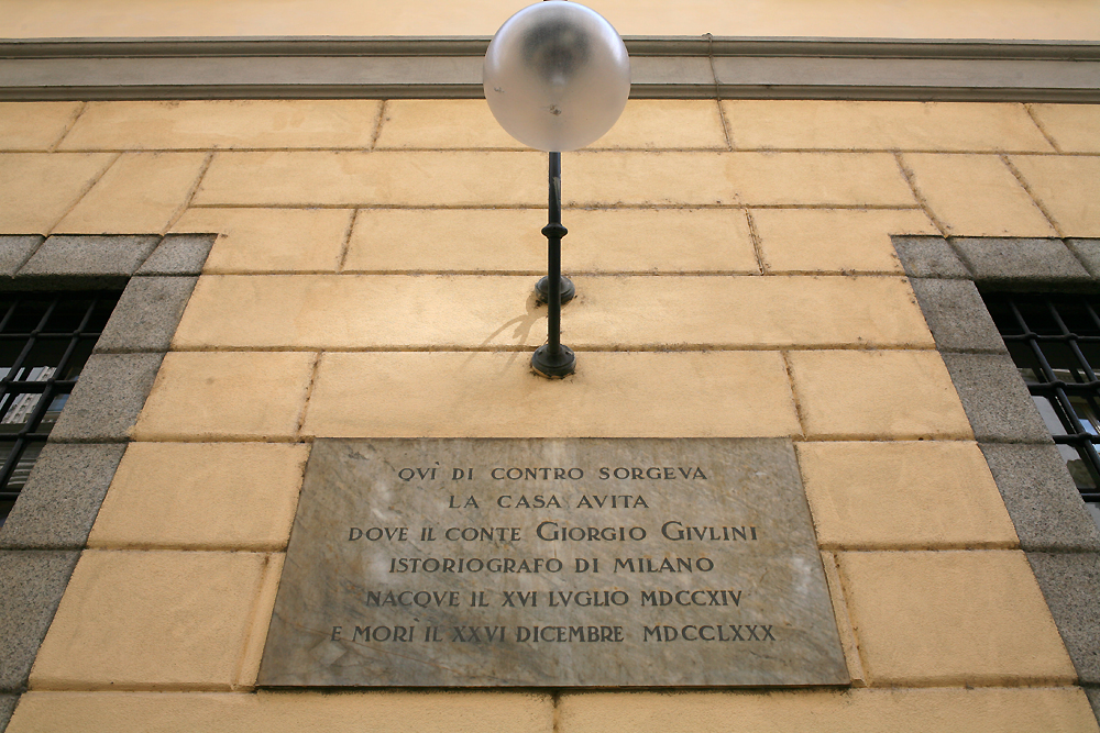 Lapide a ricordo dell'abitazione del conte Giorgio Giulini (1714-1780), in via Rovello a Milano